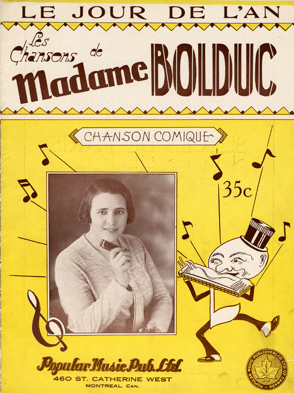 Sheet music for La Bolduc's song, "Le Jour de l'An", about her family's New Year traditions. La Bolduc (née Mary Rose Anna Travers le 4 juin 1894 à Newport (Gaspésie), Québec et morte à Montréal le 20 février 1941) est un auteur-compositeur-interprète québécois.